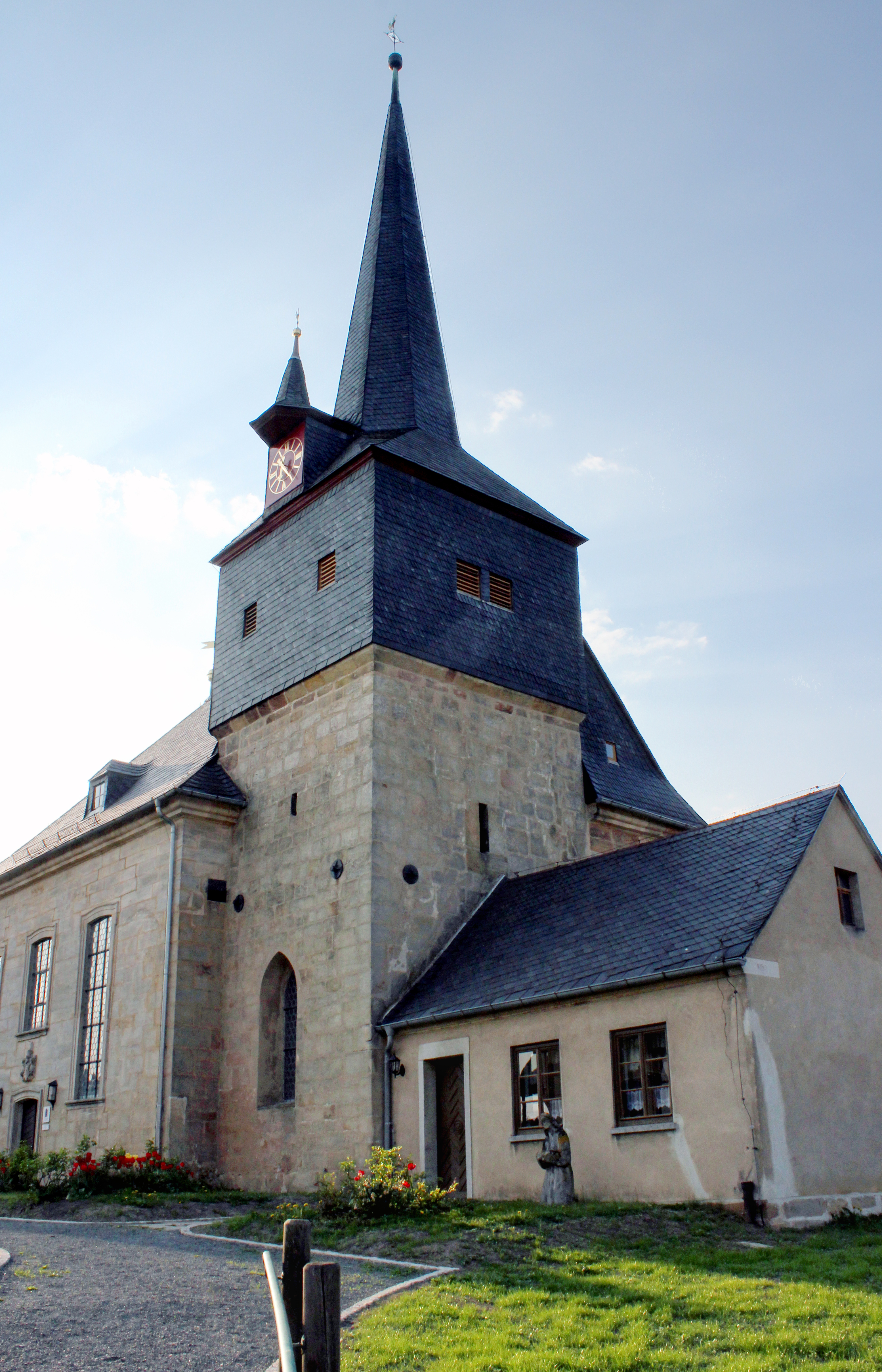 Die Pfarrkirche von Gärtenroth mit Sakristei